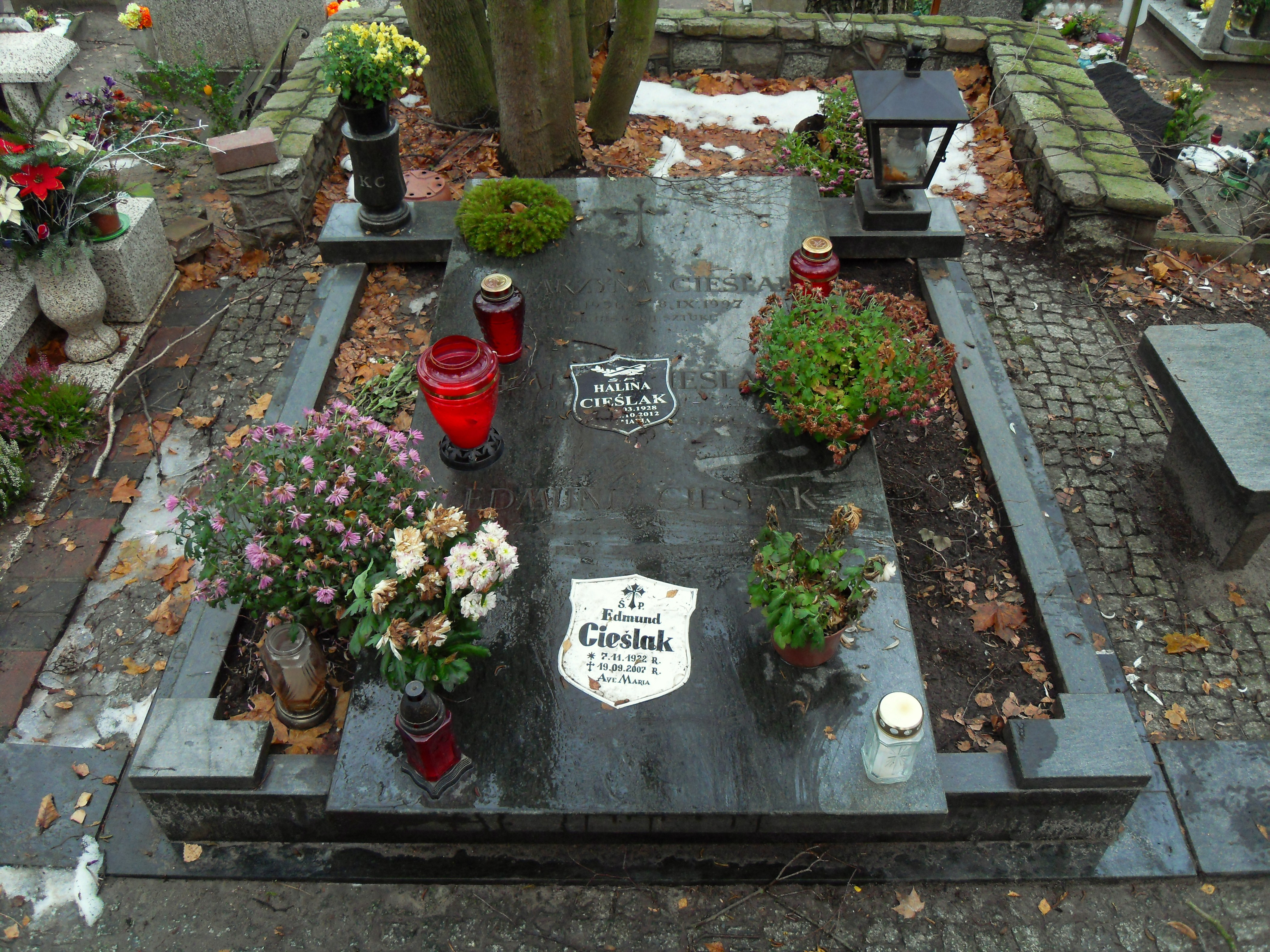 Gdańsk Wrzeszcz. Cmentarz Srebrzysko, grób historyka Edmunda Cieślaka.